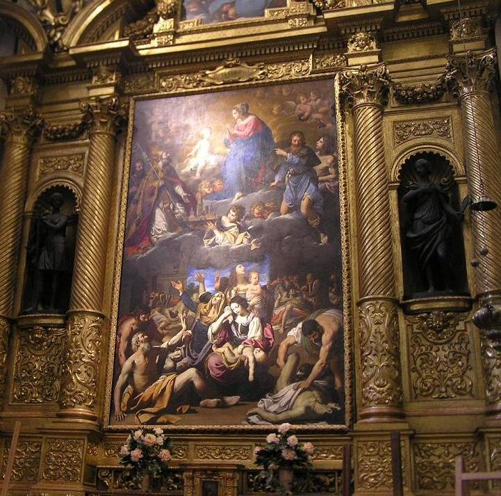 La grande pala di poco posteriore al 1630 che si trova all'interno della Chiesa del Voto, e che rappresenta nella parte inferiore scene della peste e in quella superiore la Vergine col Bambino con santi, angeli e su un piatto è l'offerta della città riconoscibile dalle torri del duomo e del palazzo comunale.